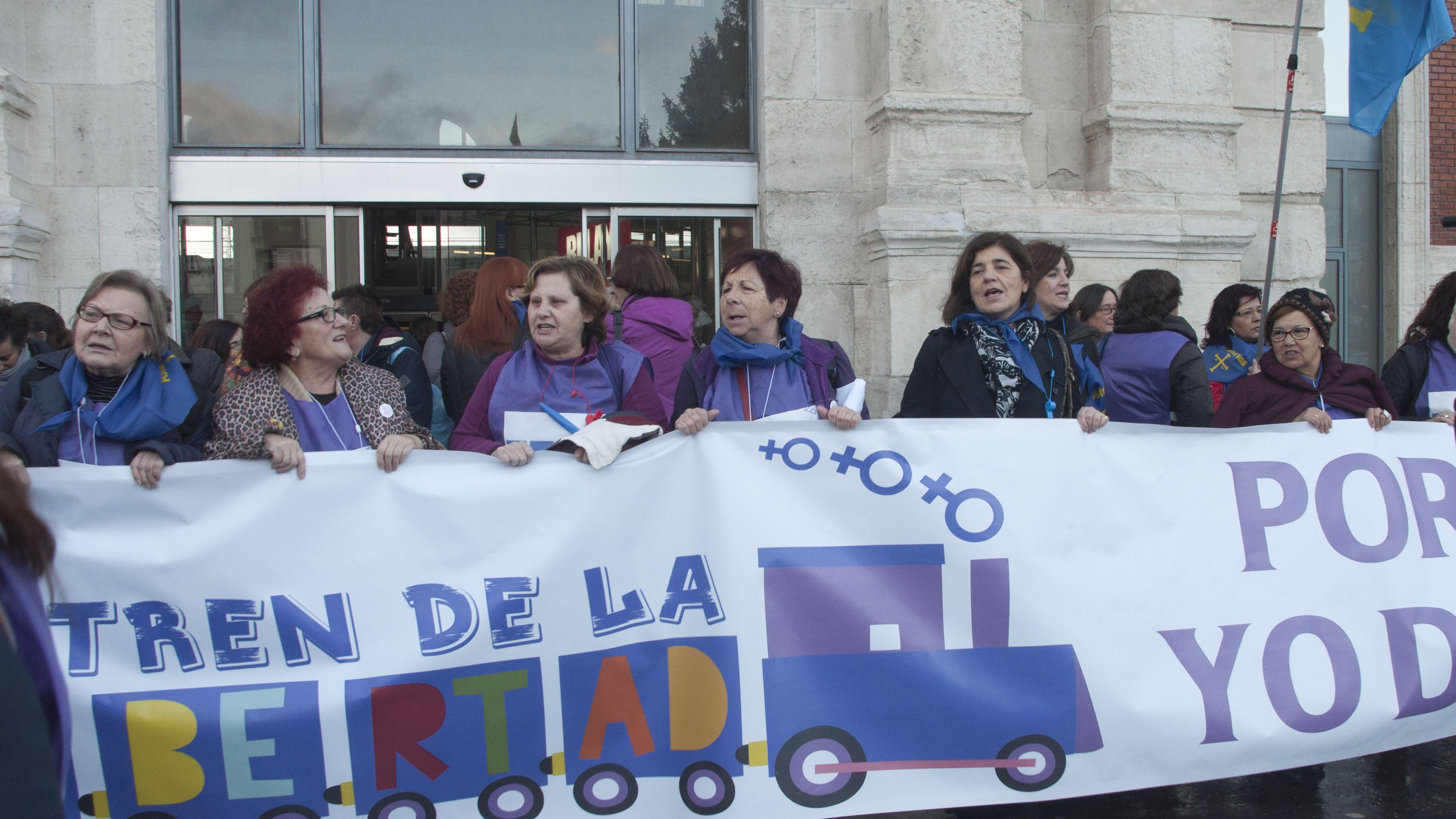 El tren de la libertad. Una de las mayores movilizaciones del movimiento feminista en España, para reivindicar el derecho a decidir de las mujeres. Arrancó de Gijón hasta Madrid con parada en Valladolid.